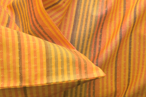 Kanafasový vzor Evy Jandíkové Yellow Chilli s drobnými vazebnými ozdobami